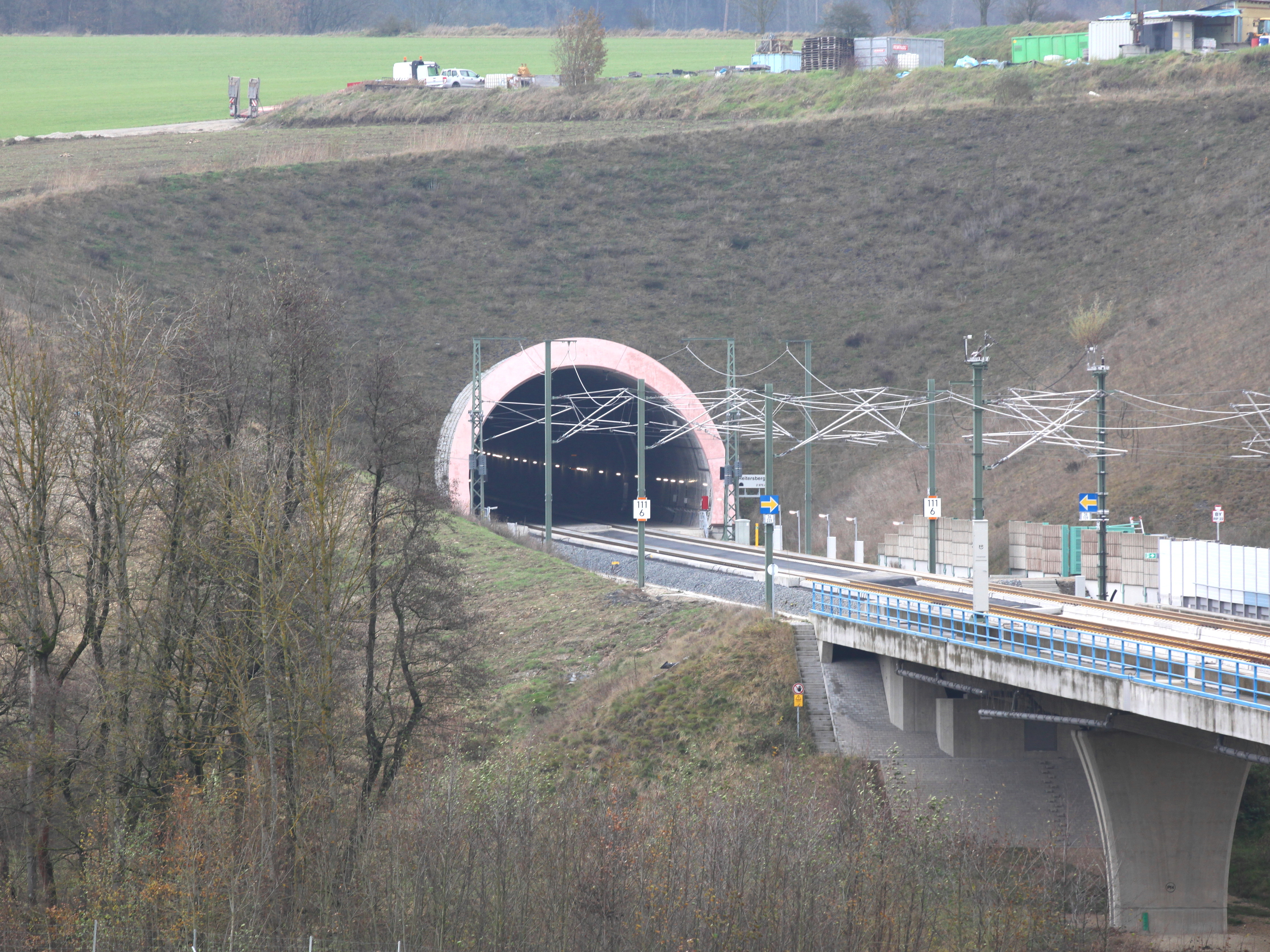 Tunnel Reitersberg, Südportal